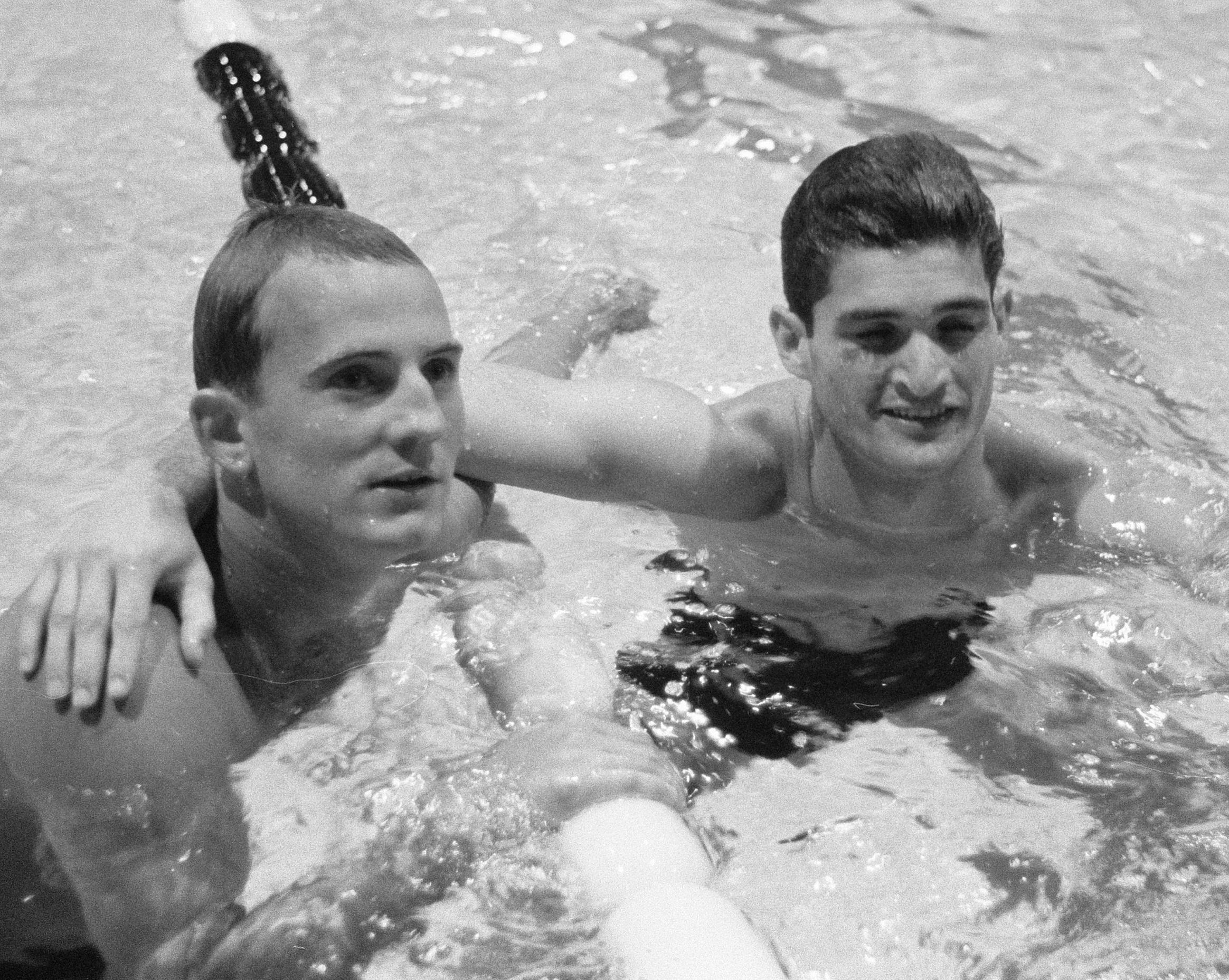 Olympische Spelen te Rome, Manuel dos Santos (Brazilië, brons op de 100 meter vrije slag) en de Hongaar Dobay. Location: Brazilie, Rome